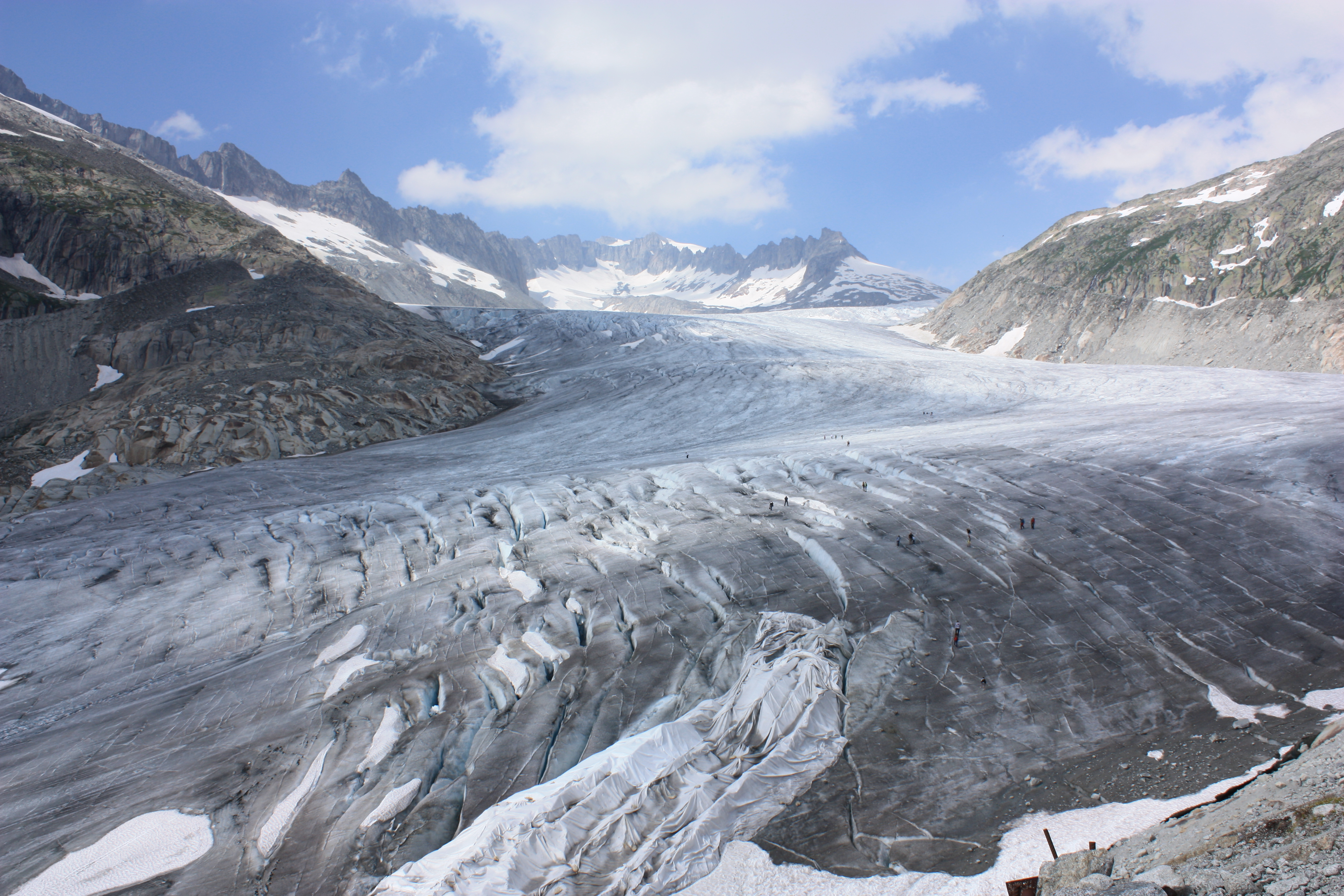 Vue sur le glacier du Rhône depuis la Belvedere